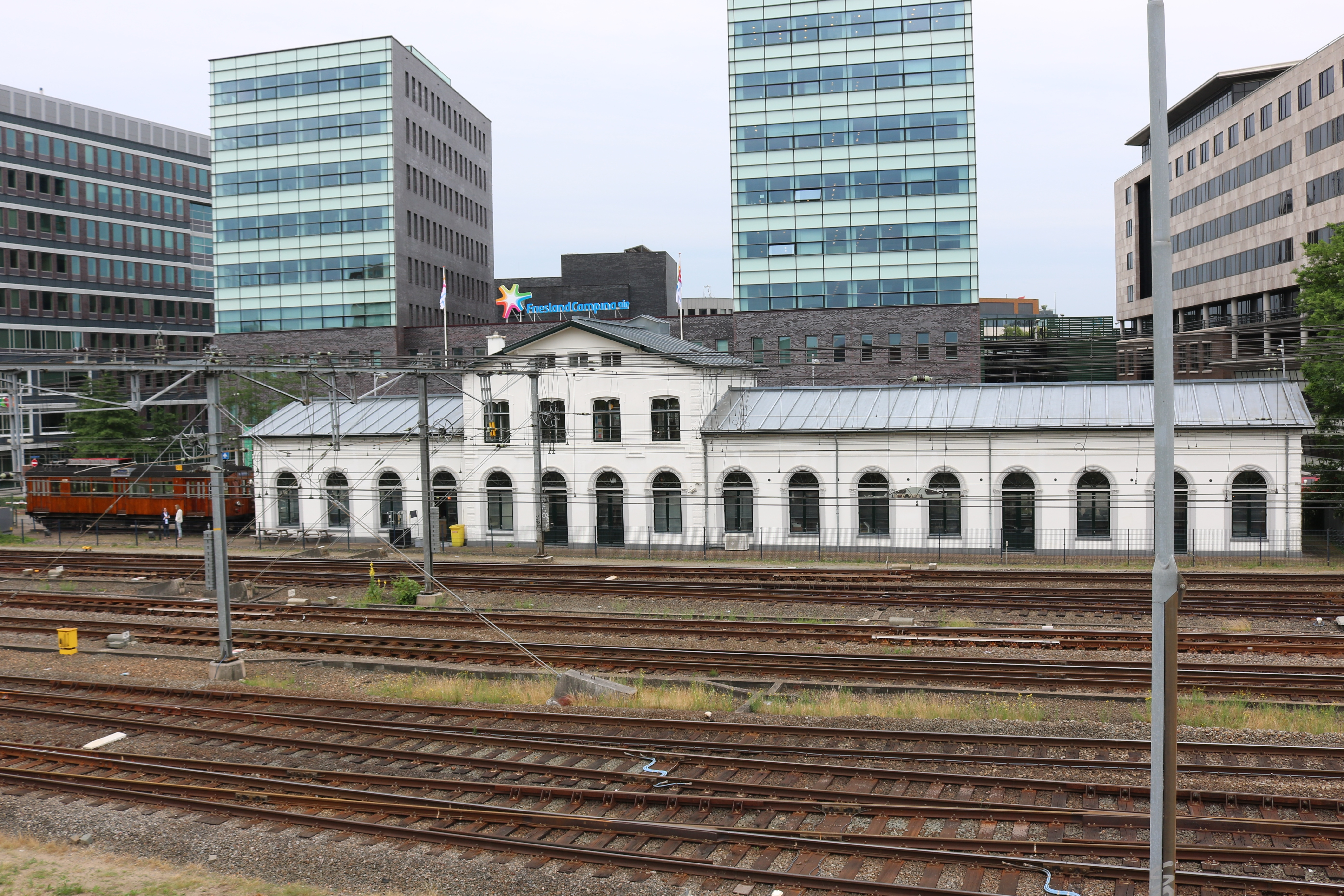 Amersfoort, voormalig NCS station (foto Daniel van der Ree, 14 juni 2018)